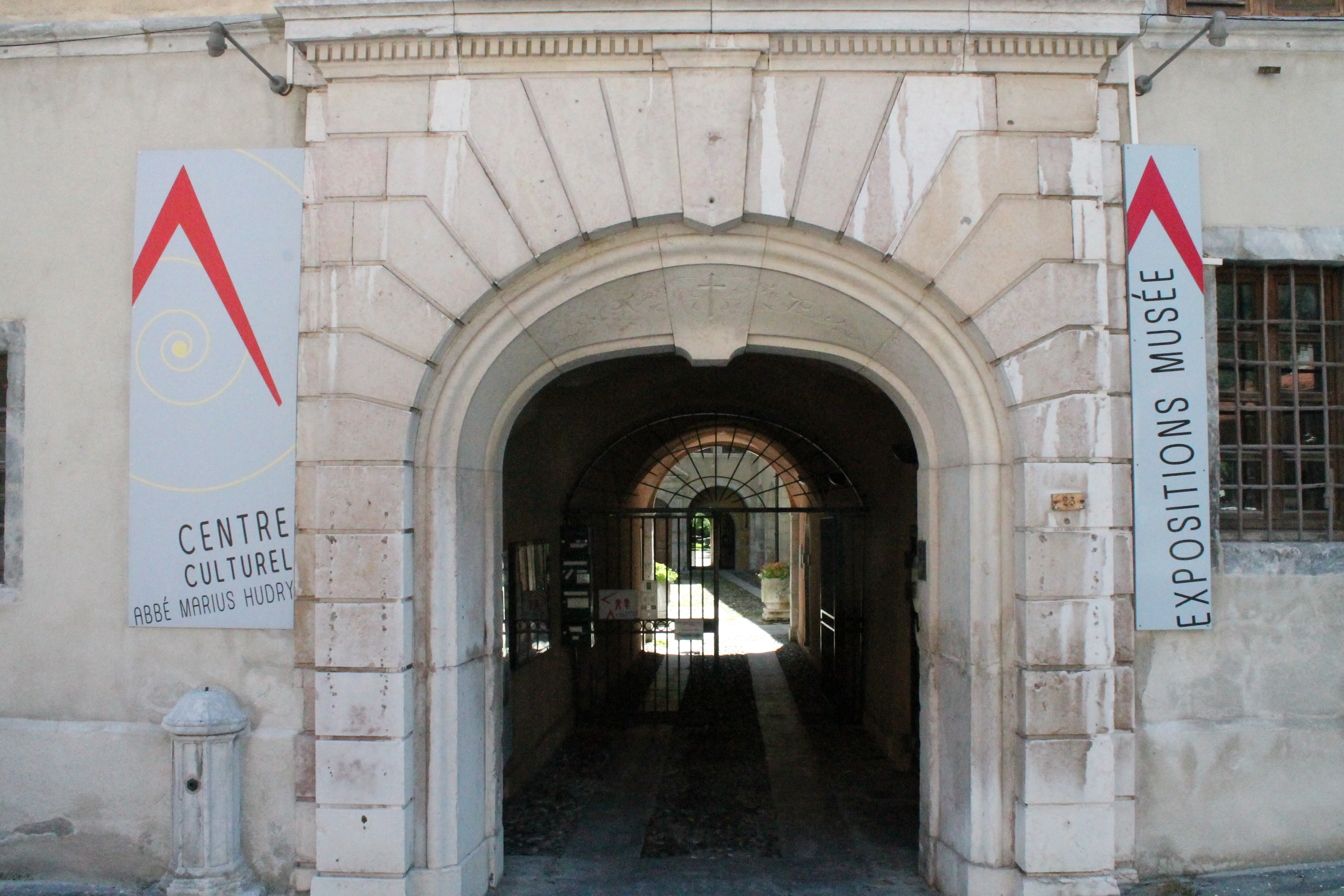 Entrée, façade côté ville.